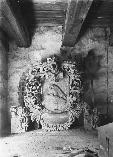 Huvudbanér över Berent Papegoja, död 1700. Kategori: (09) VapenHuvudbanér över Berent Papegoja, död 1700.